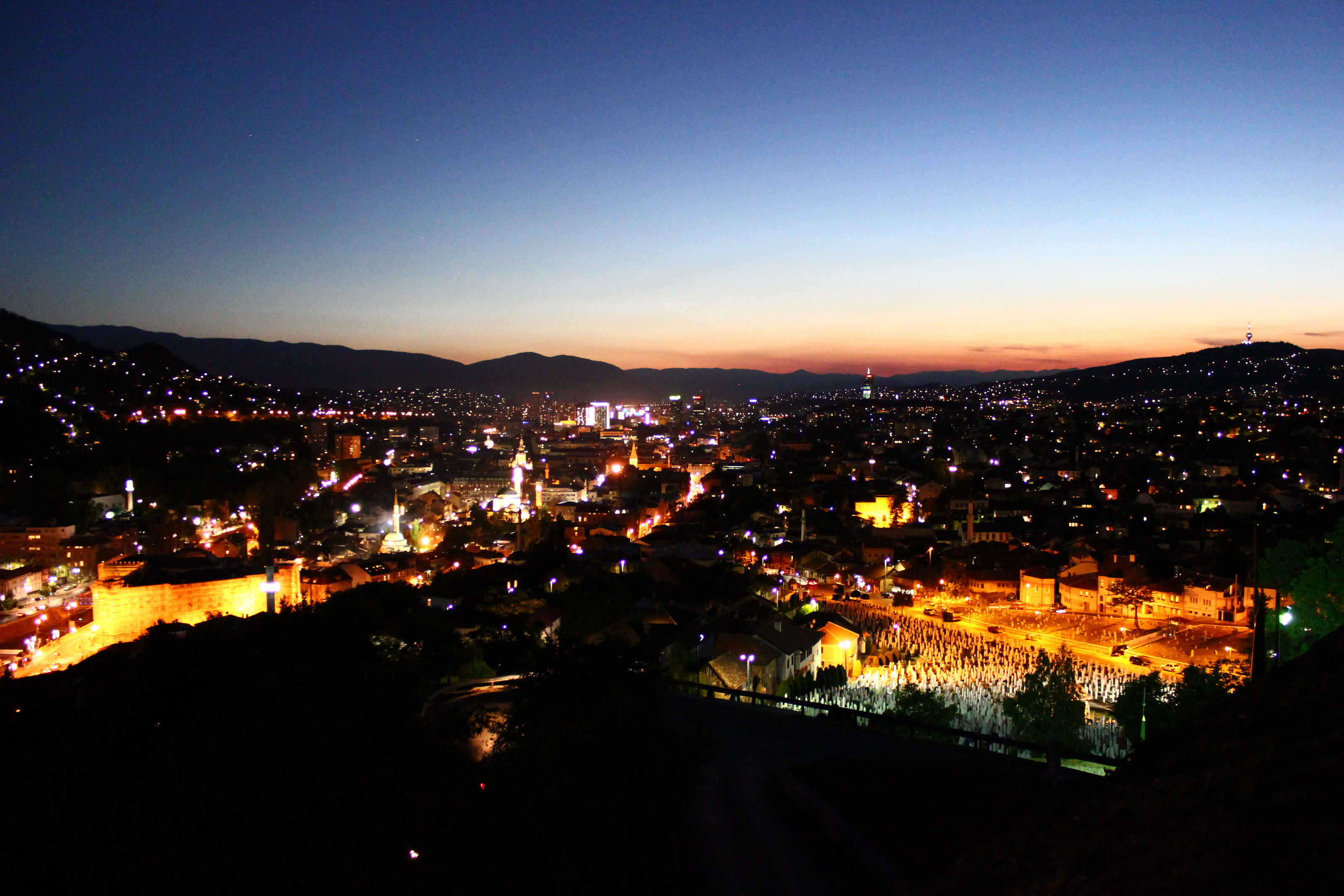 Die bosnische Hauptstadt im Dunkeln, gesehen von Osten.